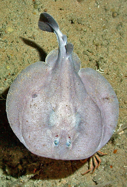 Tetronarce nobiliana/Torpedo nobiliana